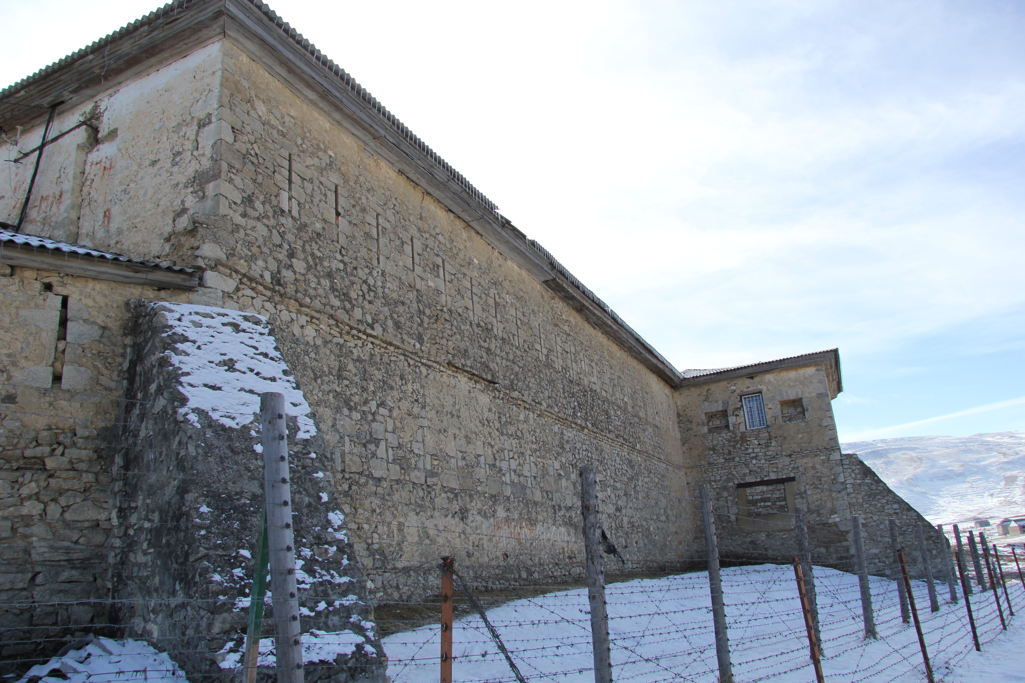 Аранинская крепость (восточная сторона)